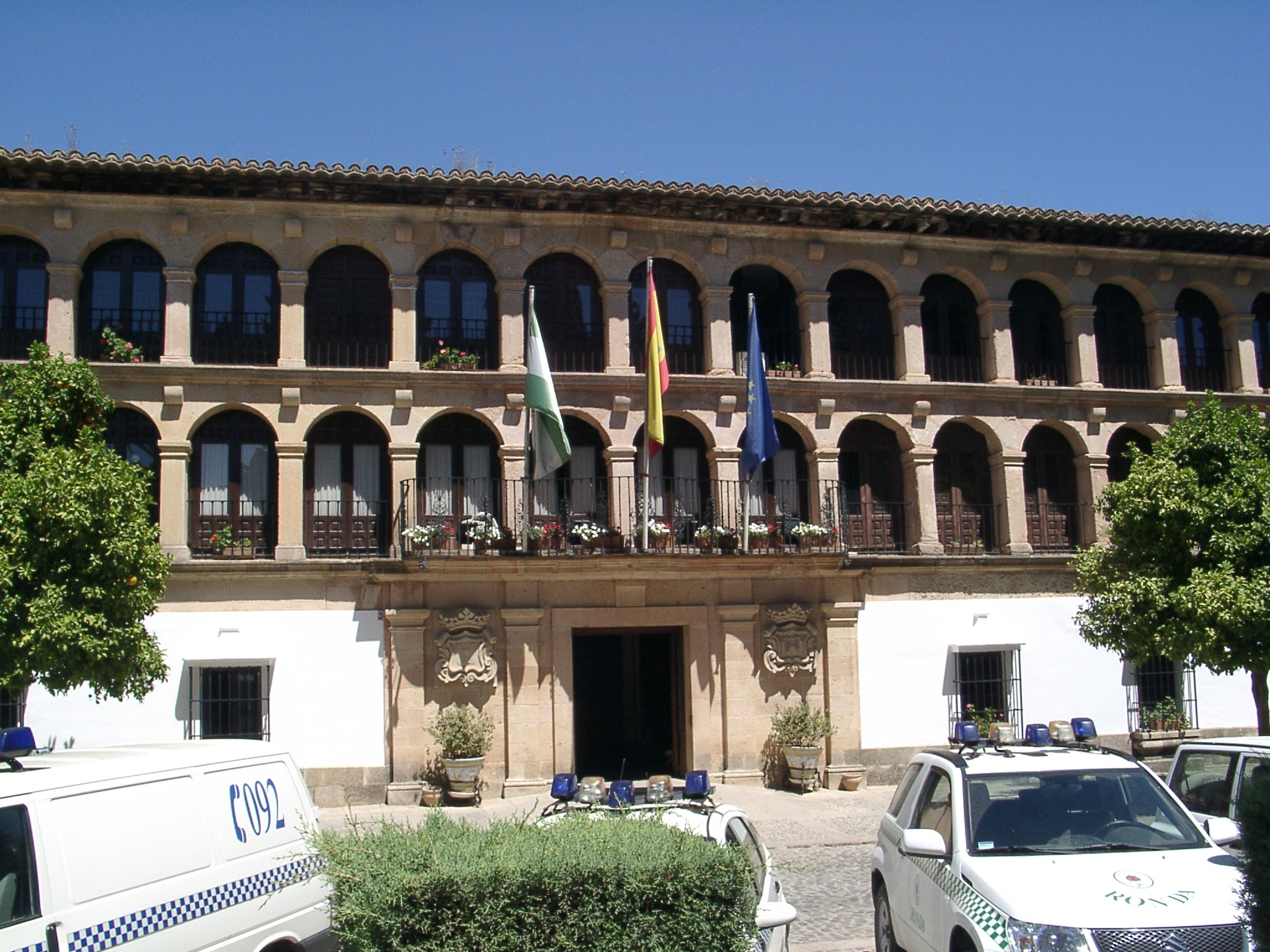 Ronda